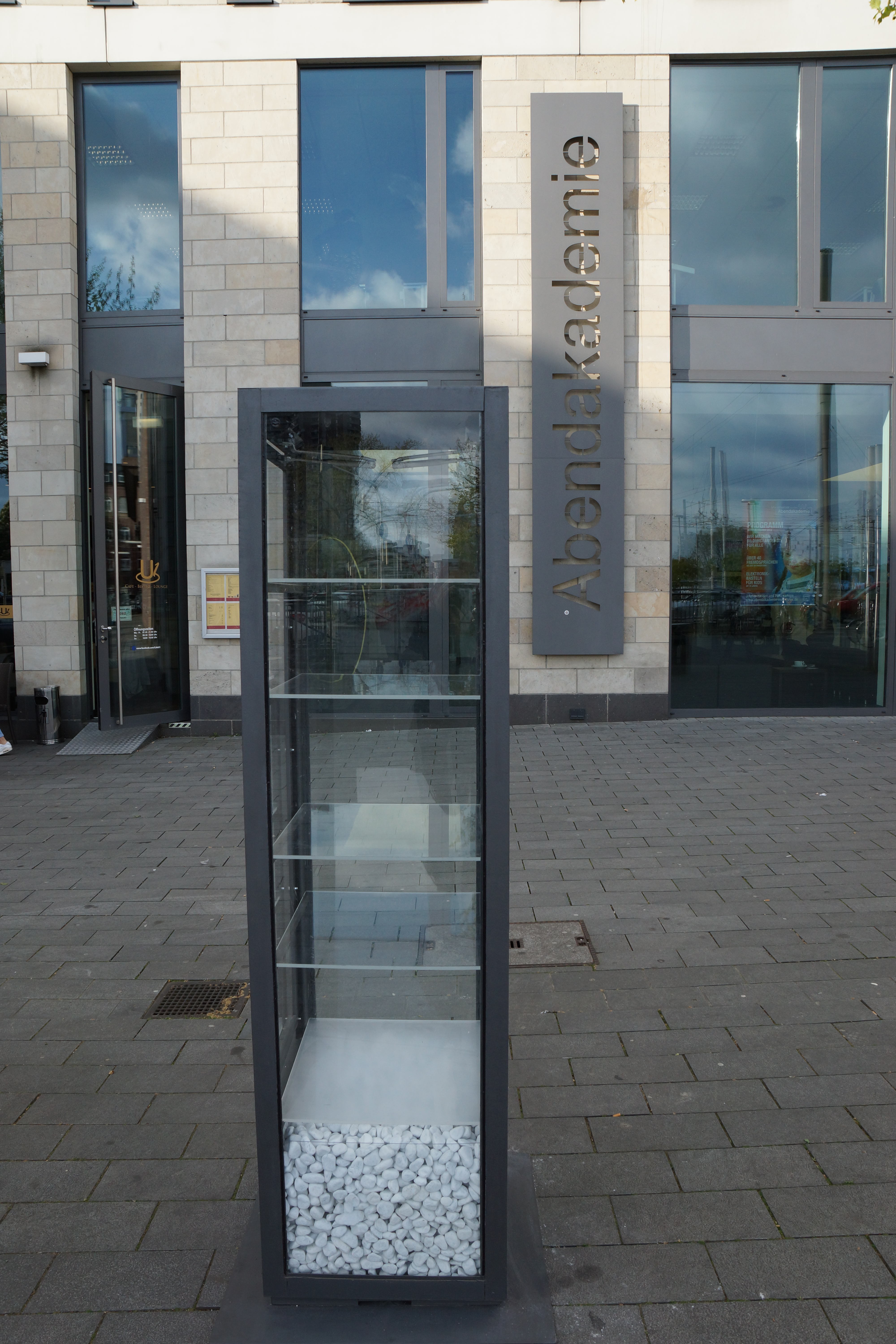 Öffentlicher Bücherschrank der Mannheimer Abendakademie auf dem Vorplatz von U 1